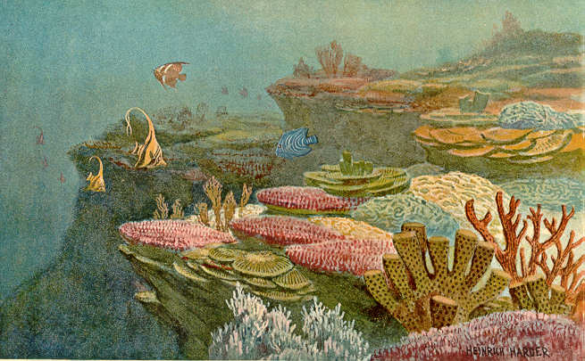 Ancient Coral Reefs